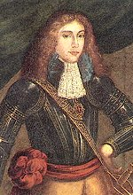 König Alfons VI. von Portugal Andere Versionen